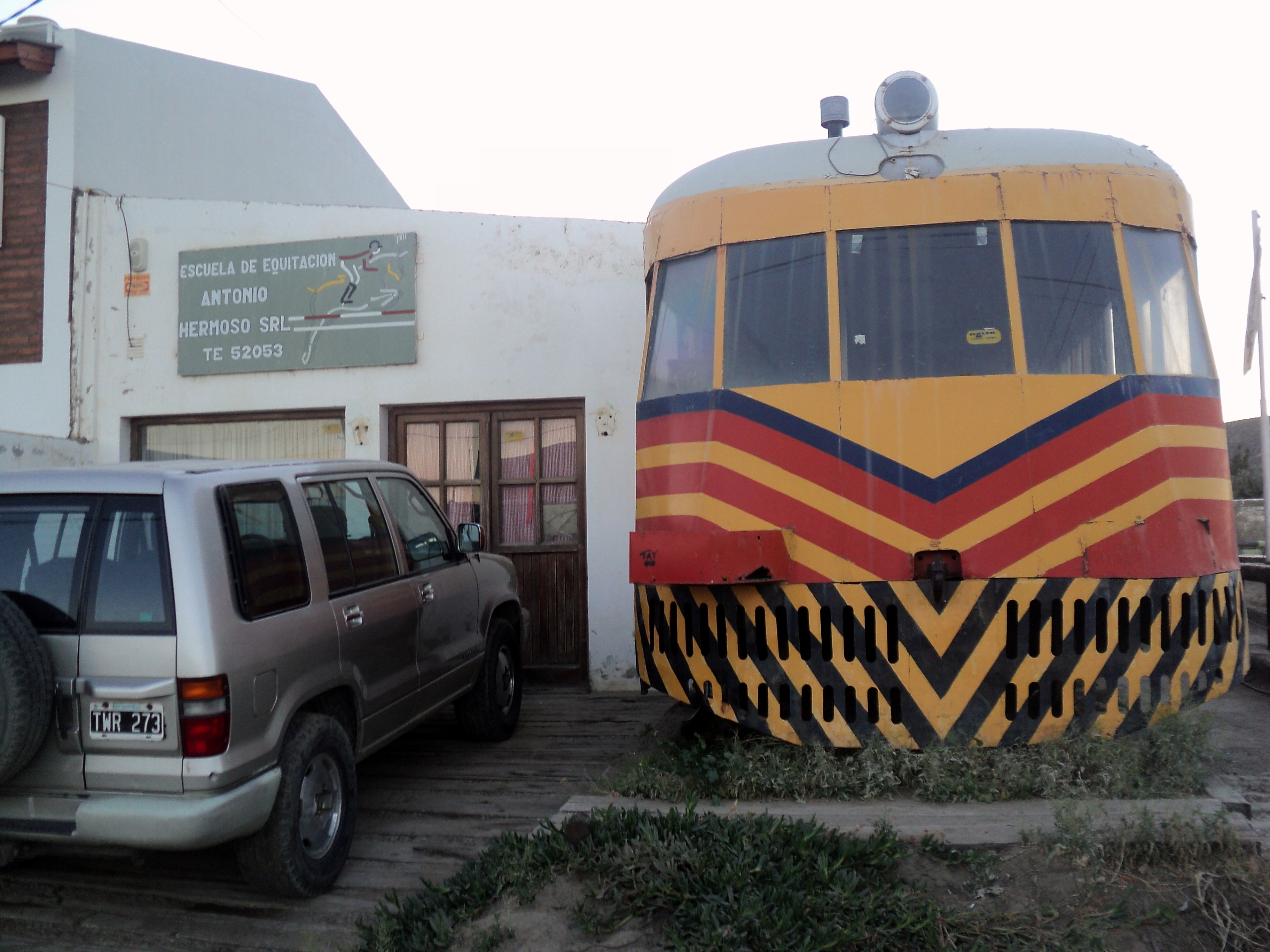 Ganz de 1935 de frente, al lado de la escuela de equitación a la que pertenece